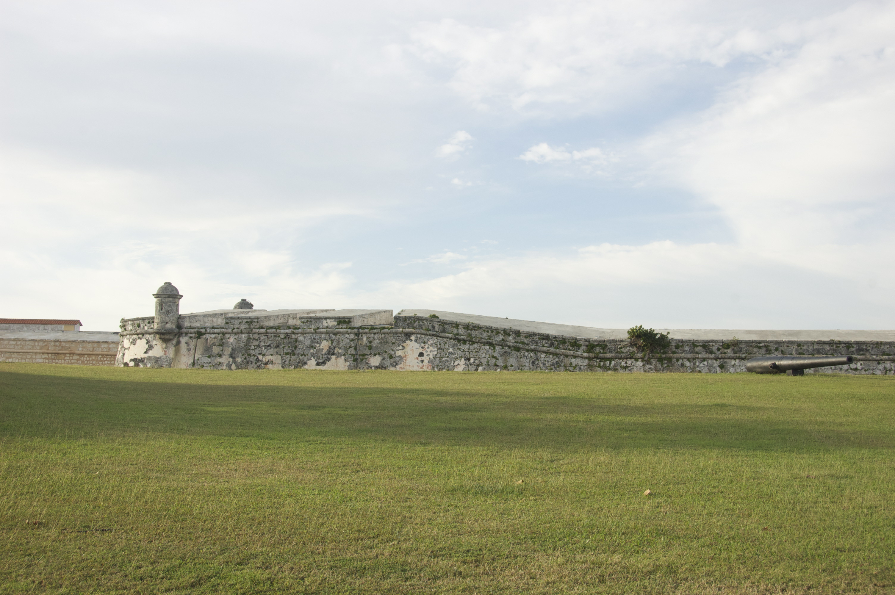 Rempart